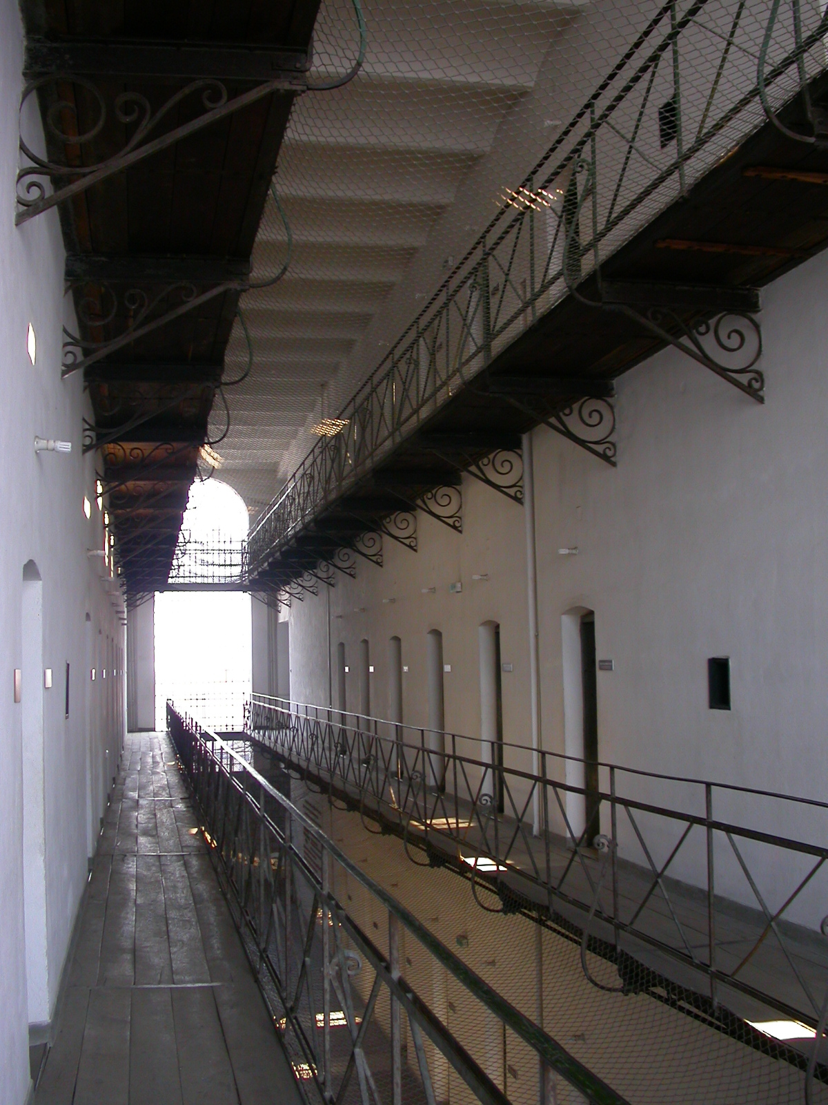 Închisoare, azi Muzeul victimelor comunismului șirezistenței anticomuniste Sighet, 1897